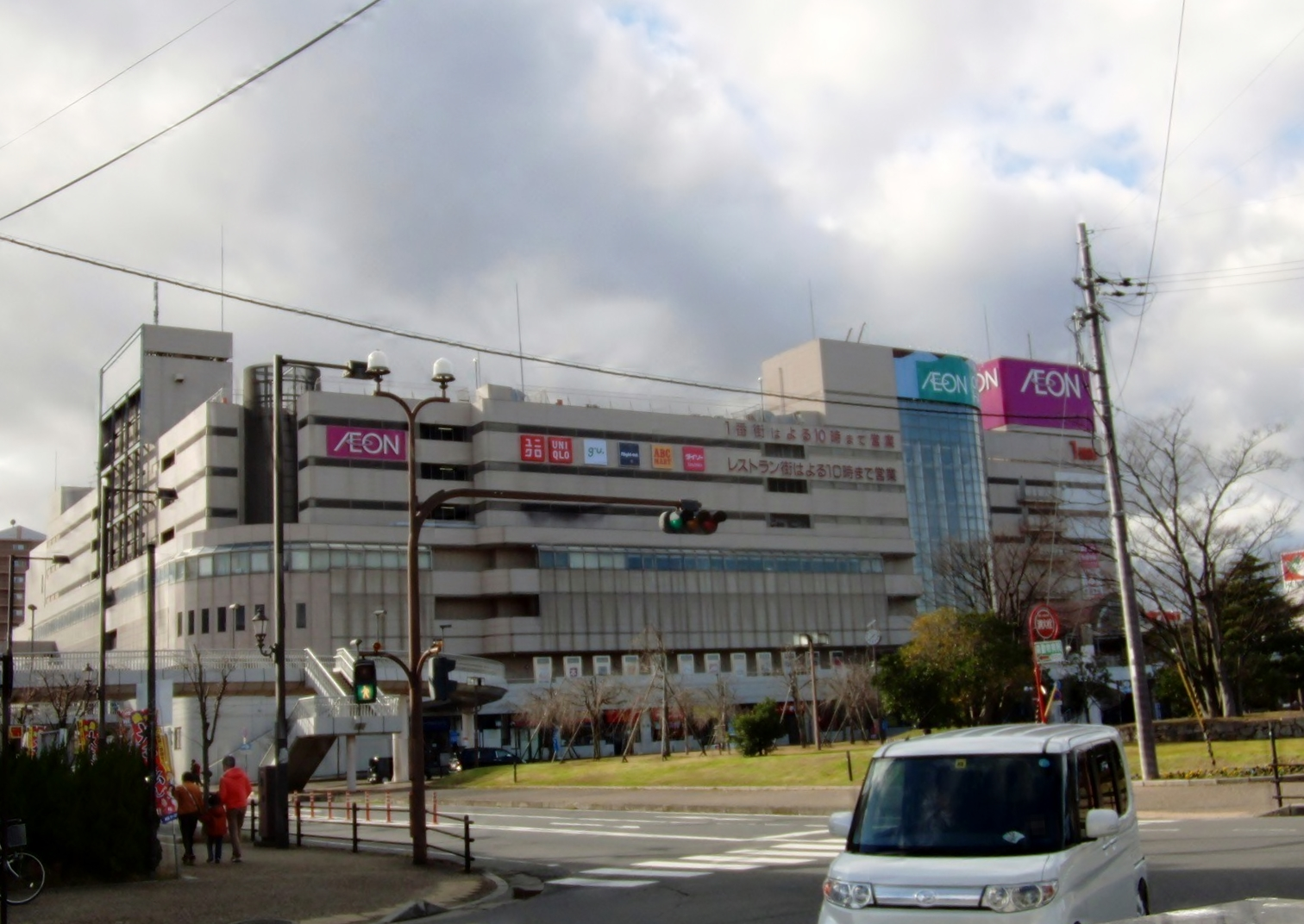 イオン近江八幡ショッピングセンター1番街を撮影